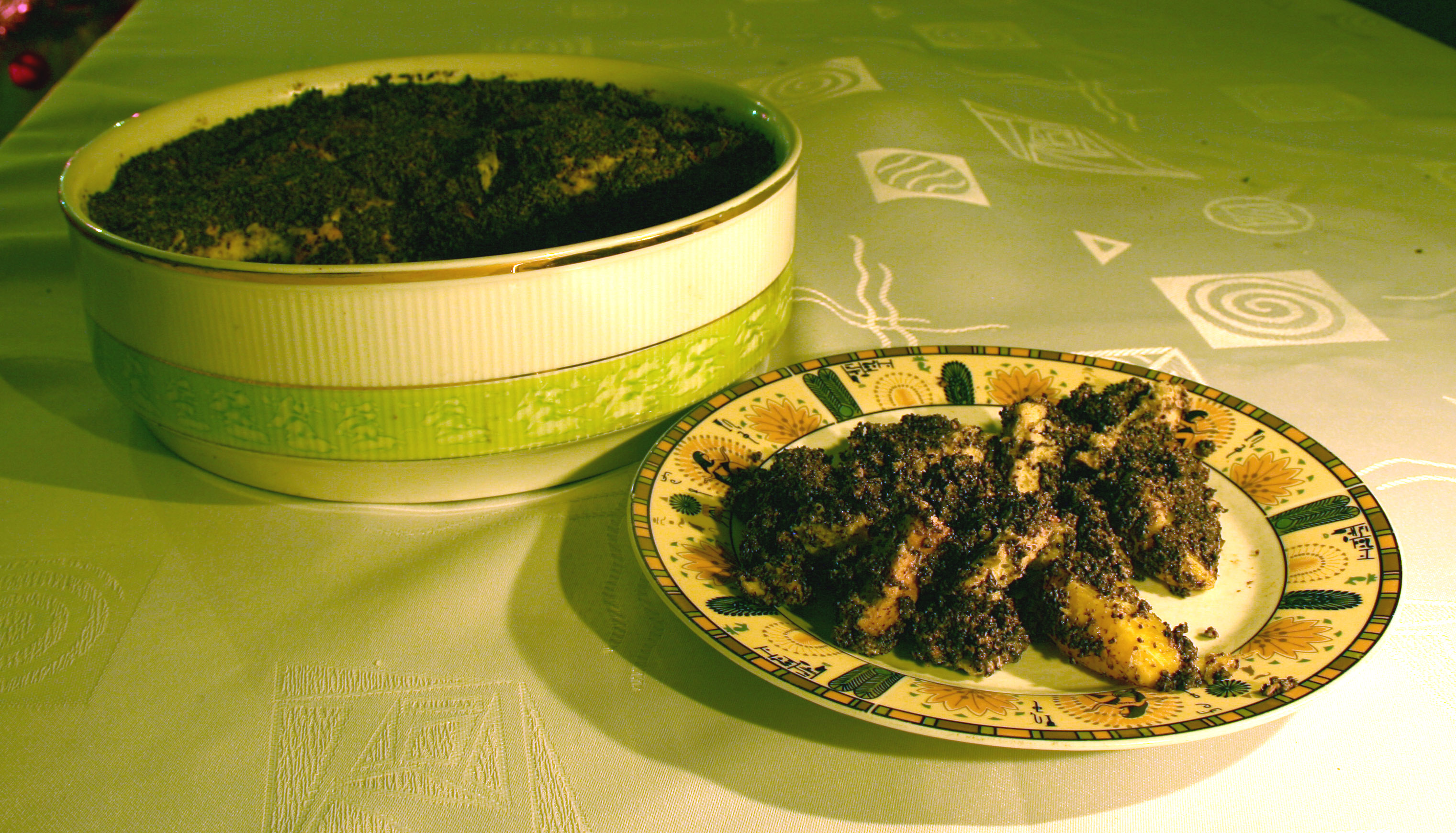 makówki - śląskie danie wigilijne